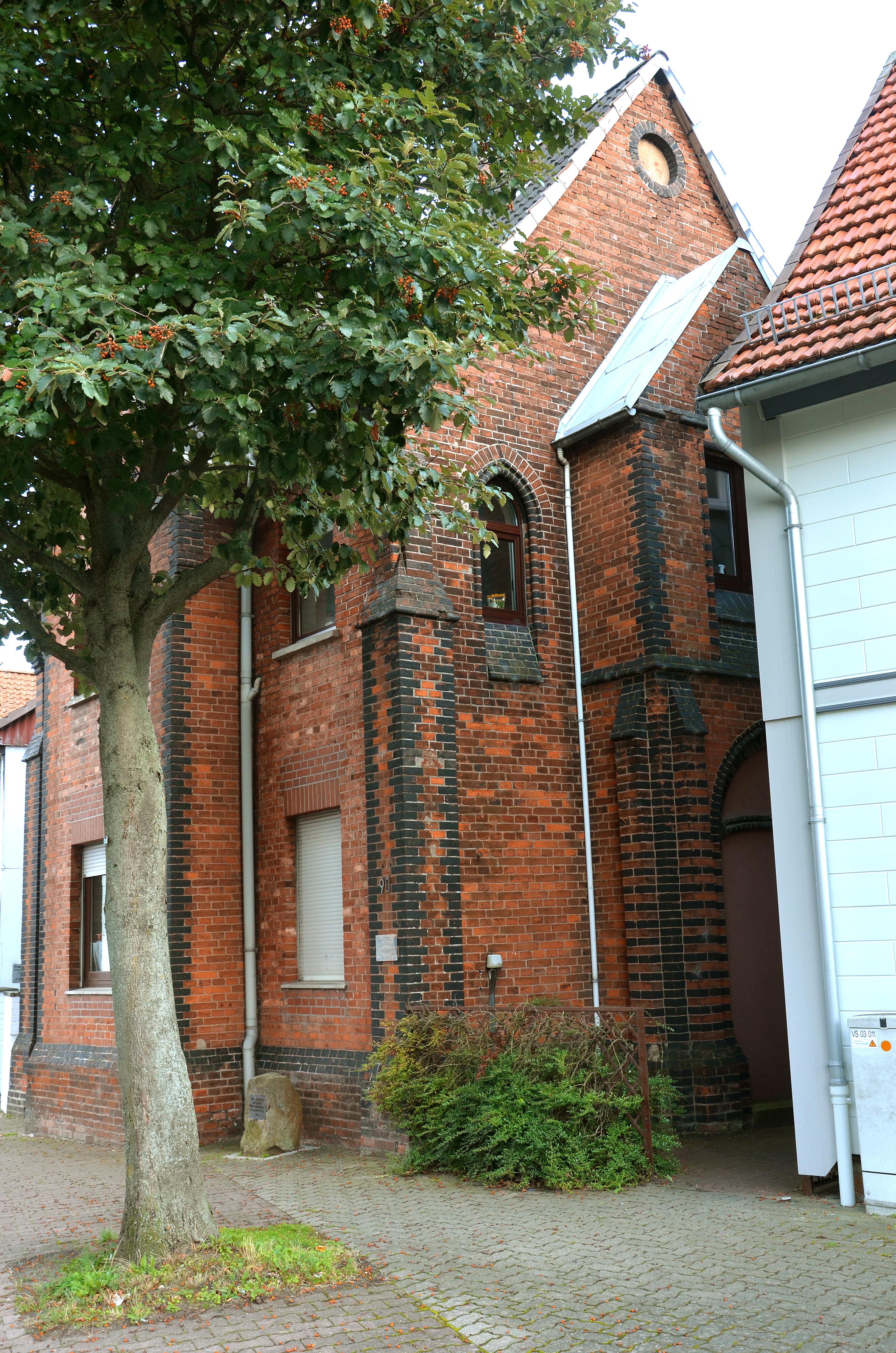 Die 1867 von der damaligen jüdischen Gemeinde der Stadt Eldagsen errichtete, heute ehemalige Synagoge unter der Adresse Lange Straße 90 ...